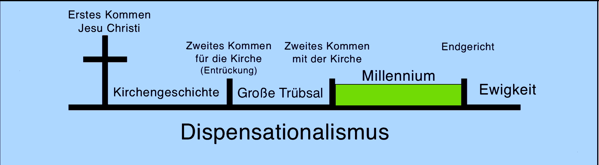 Graphische Darstellung des Dispensationalismus